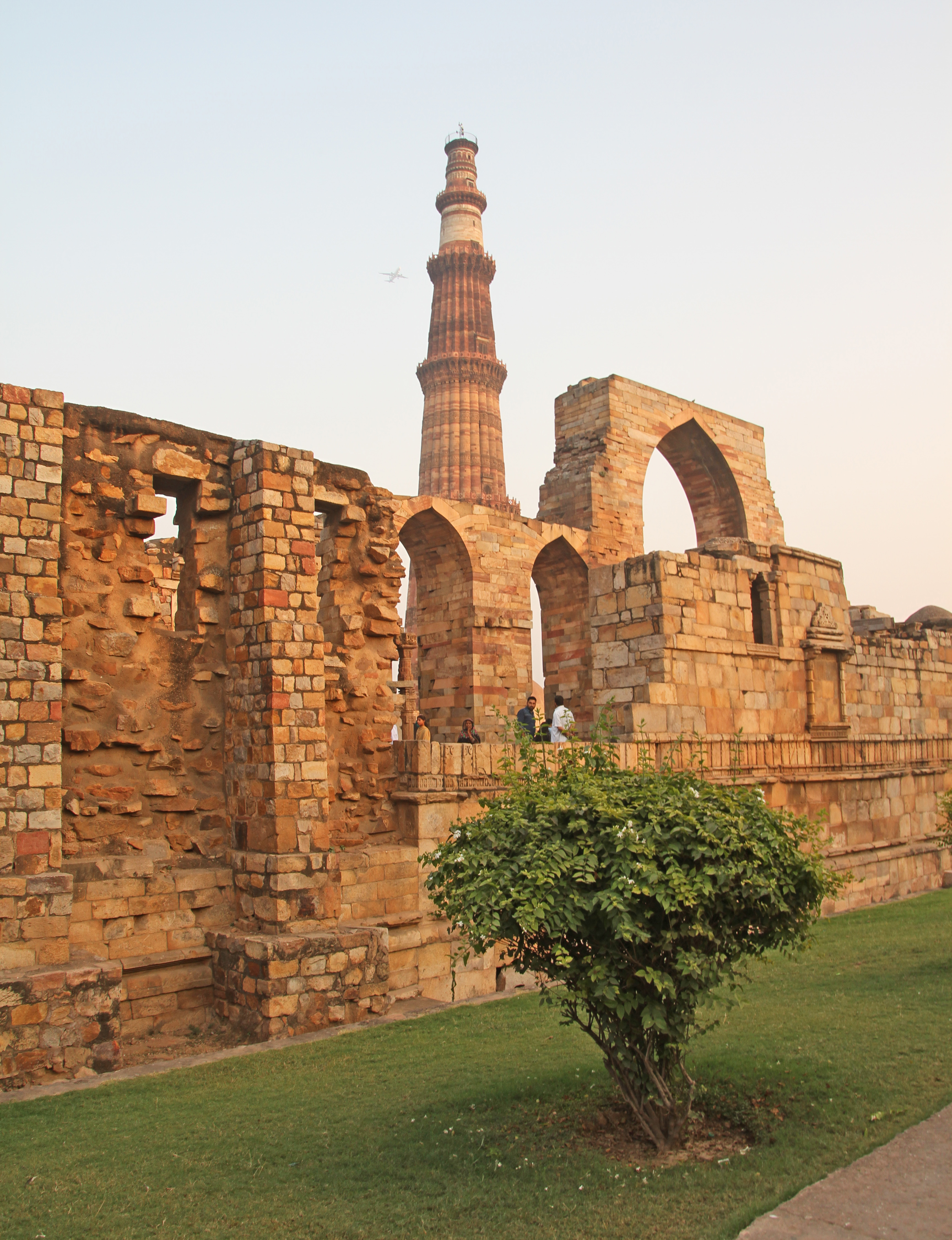 Qutb Minar